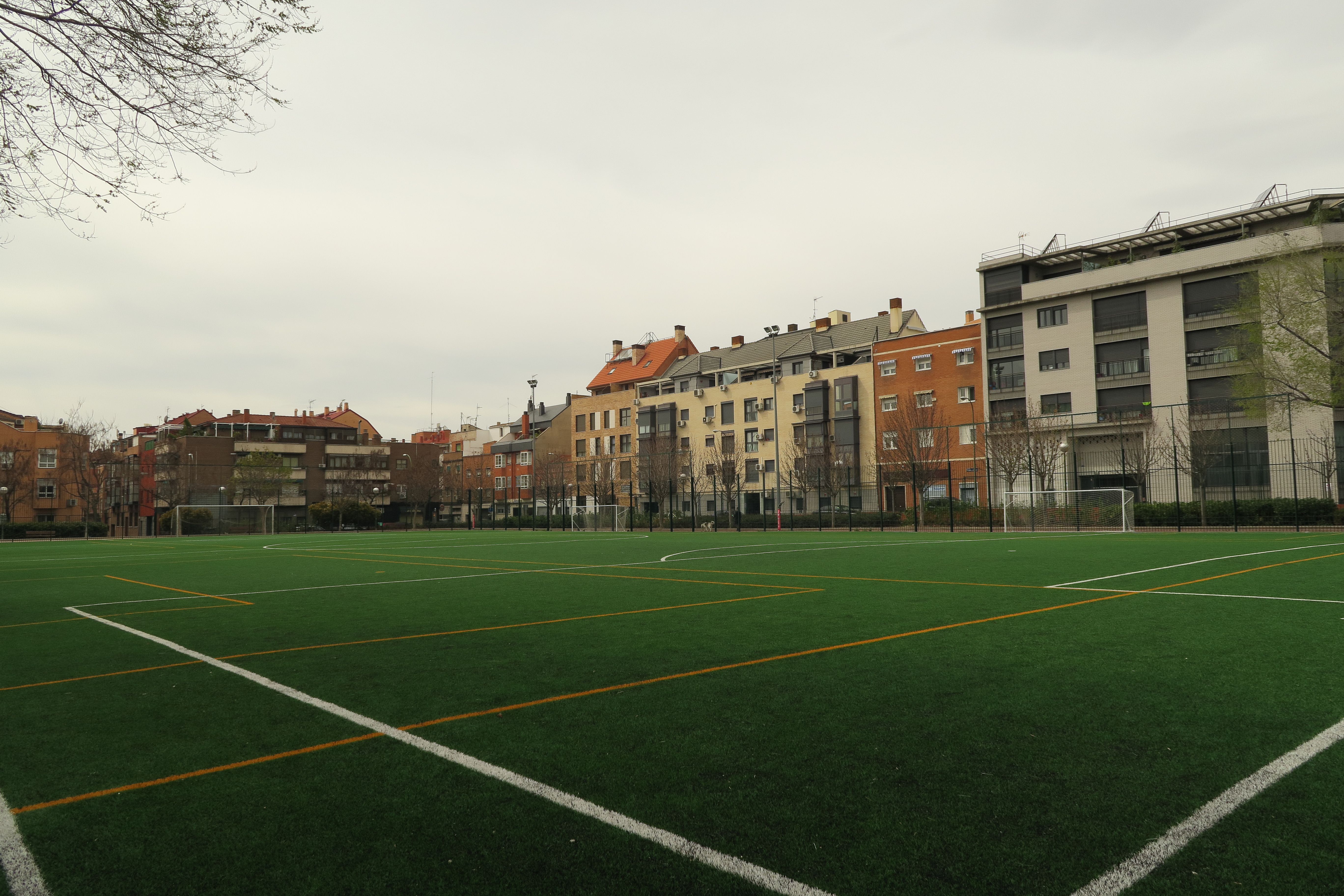 Adelfas, desde polidepertivo Las Adelfas